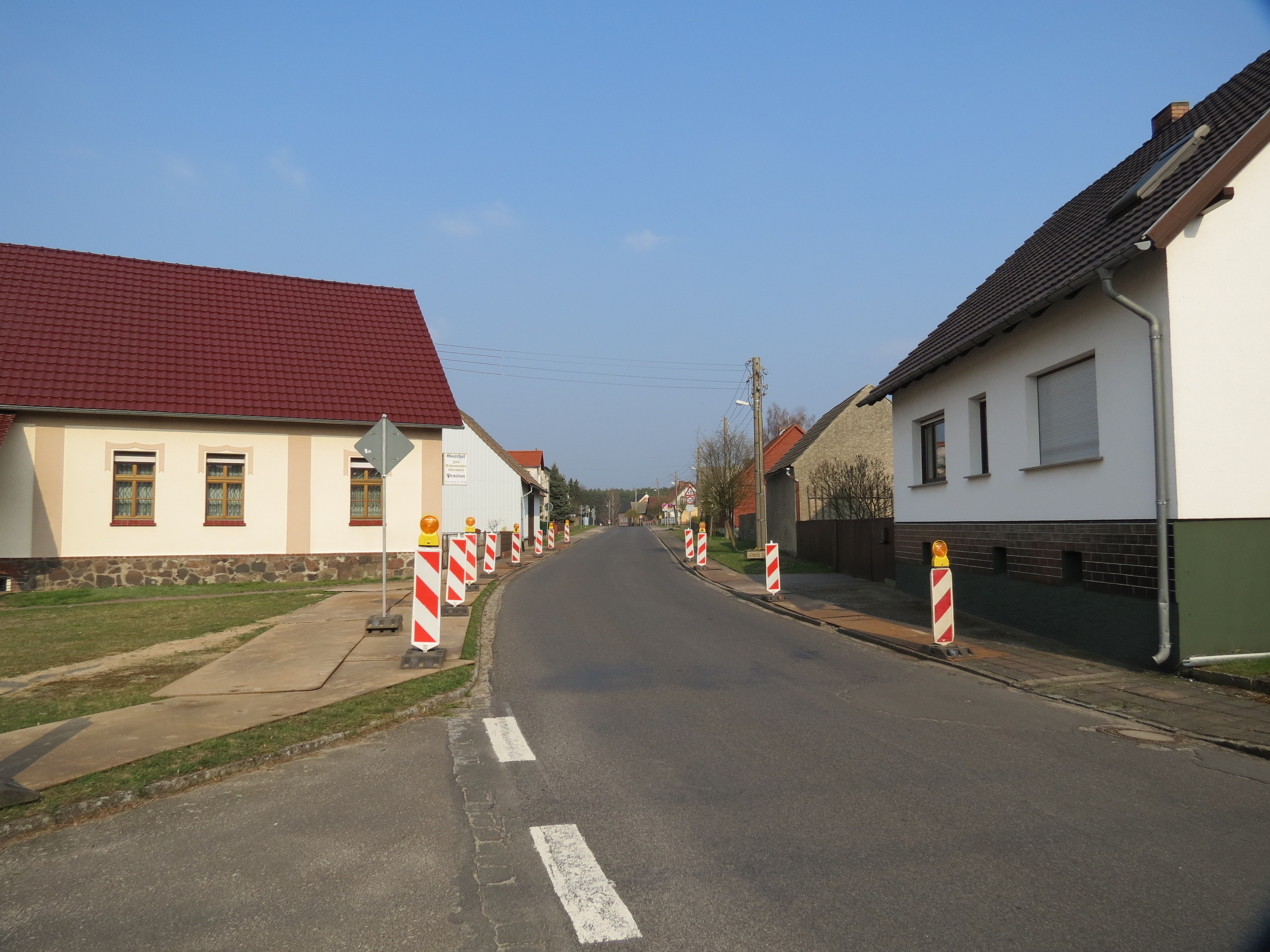 Bahnhofstraße, Blick nach Nordosten, Ullersdorf, Ortsteil der Gemeinde Jamlitz, Lanskreis Dahme-Spreewald, Brandenburg, Deutschland